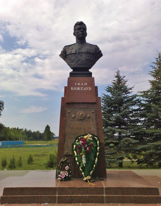 Пам'ятник уродженцю села тричі Герою Радянського Союзу І. М. Кожедубу, с. Ображіївка, центр